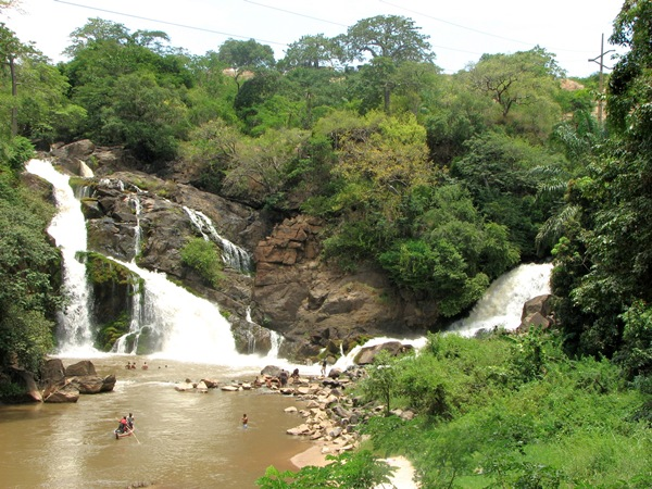 Binda Falls Queve / Cuvo River Cuanza Sul Rio Queve/Cuvo Fev/2009